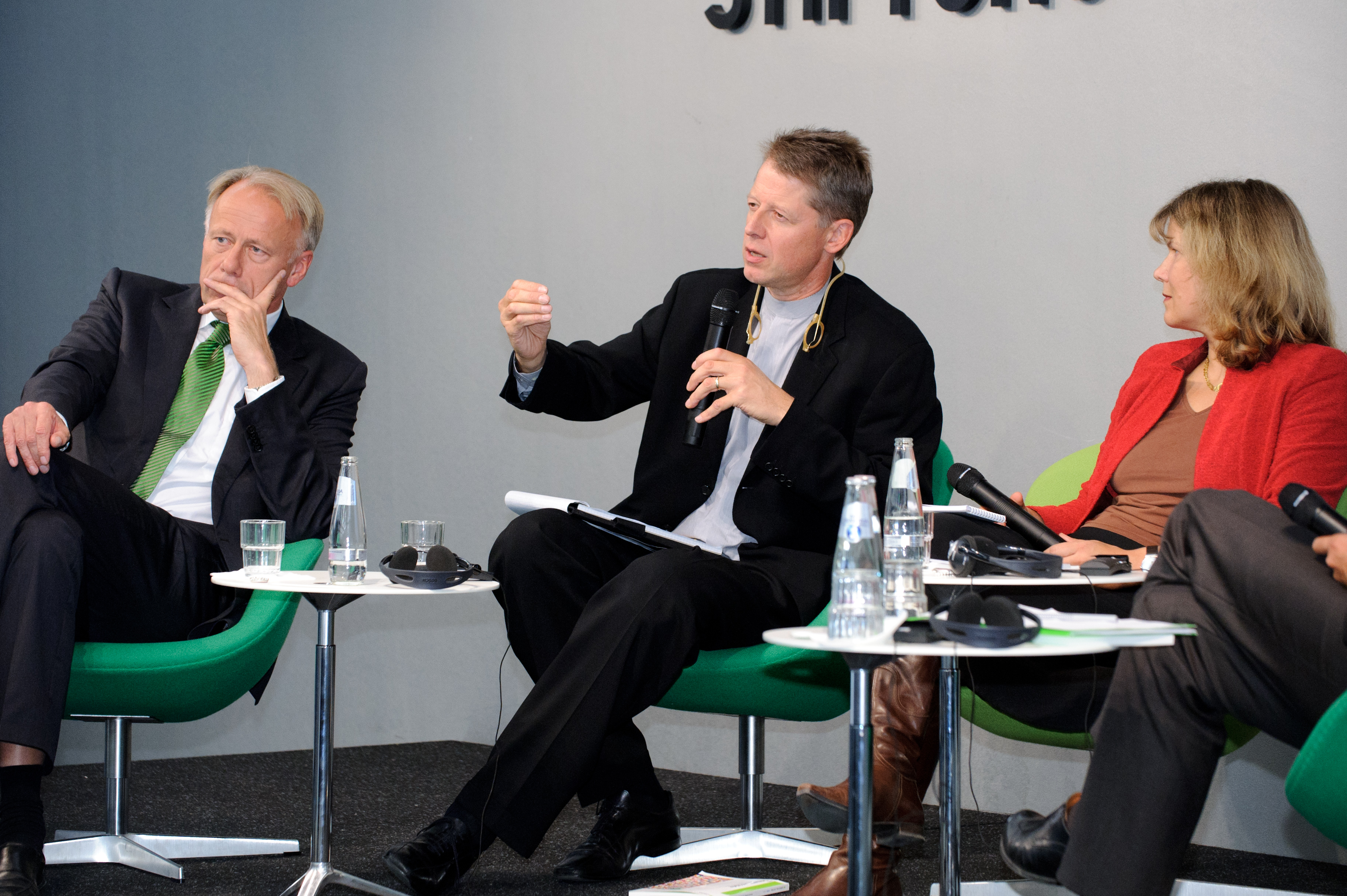 Jürgen Trittin, Andrew Moravcsik, Petra Pinzler Konferenz: Solidarität und Stärke - Zur Zukunft der Europäischen Union